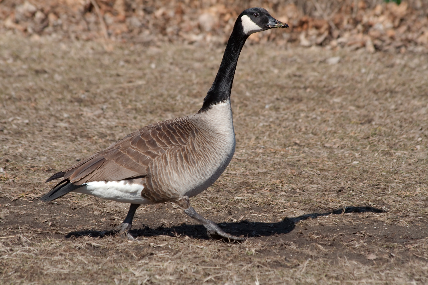 A branta canadensis/canadian goose, taken in Urbana, IL